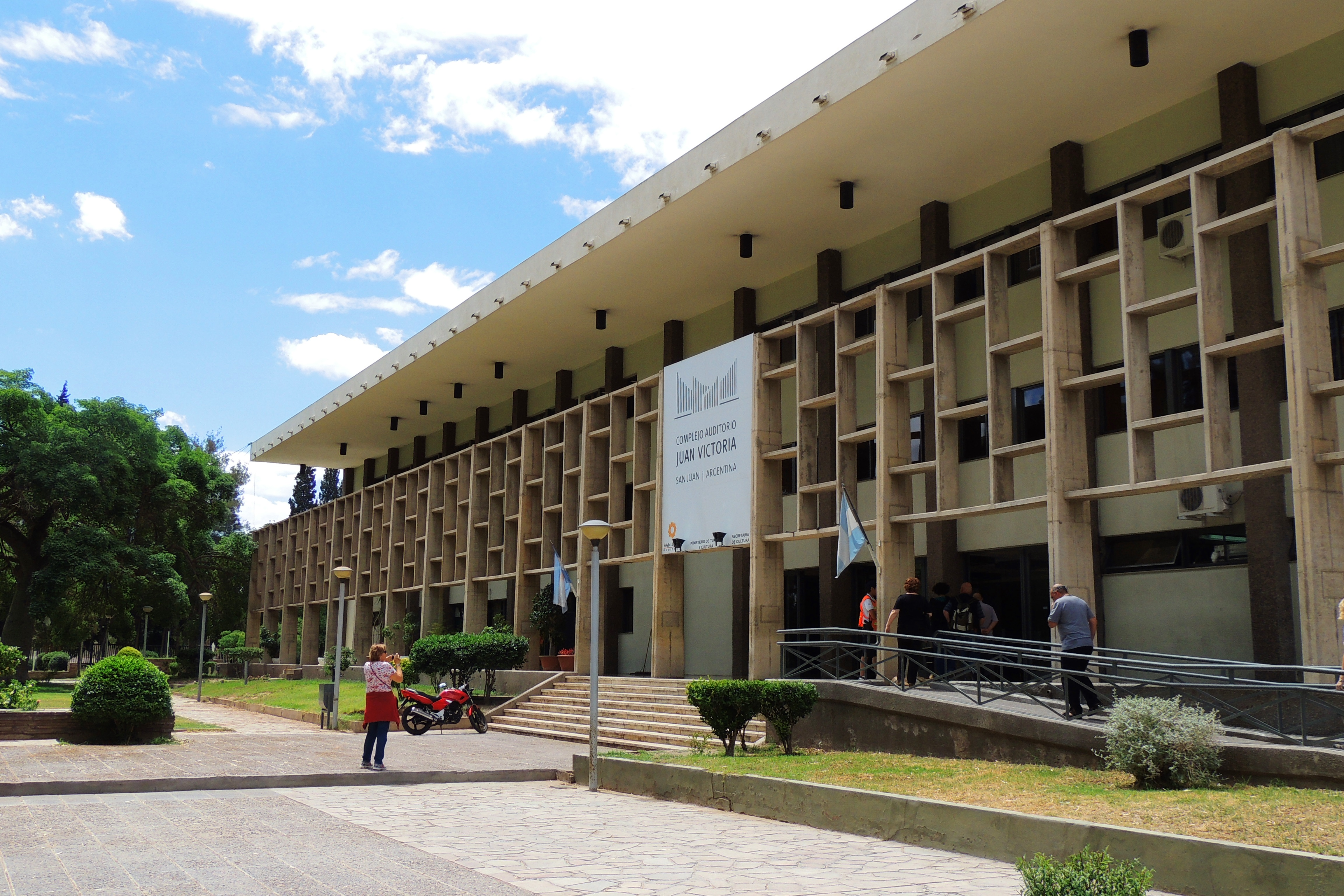 Auditorio Juan Victoria. Ciudad de San Juan, Argentina.